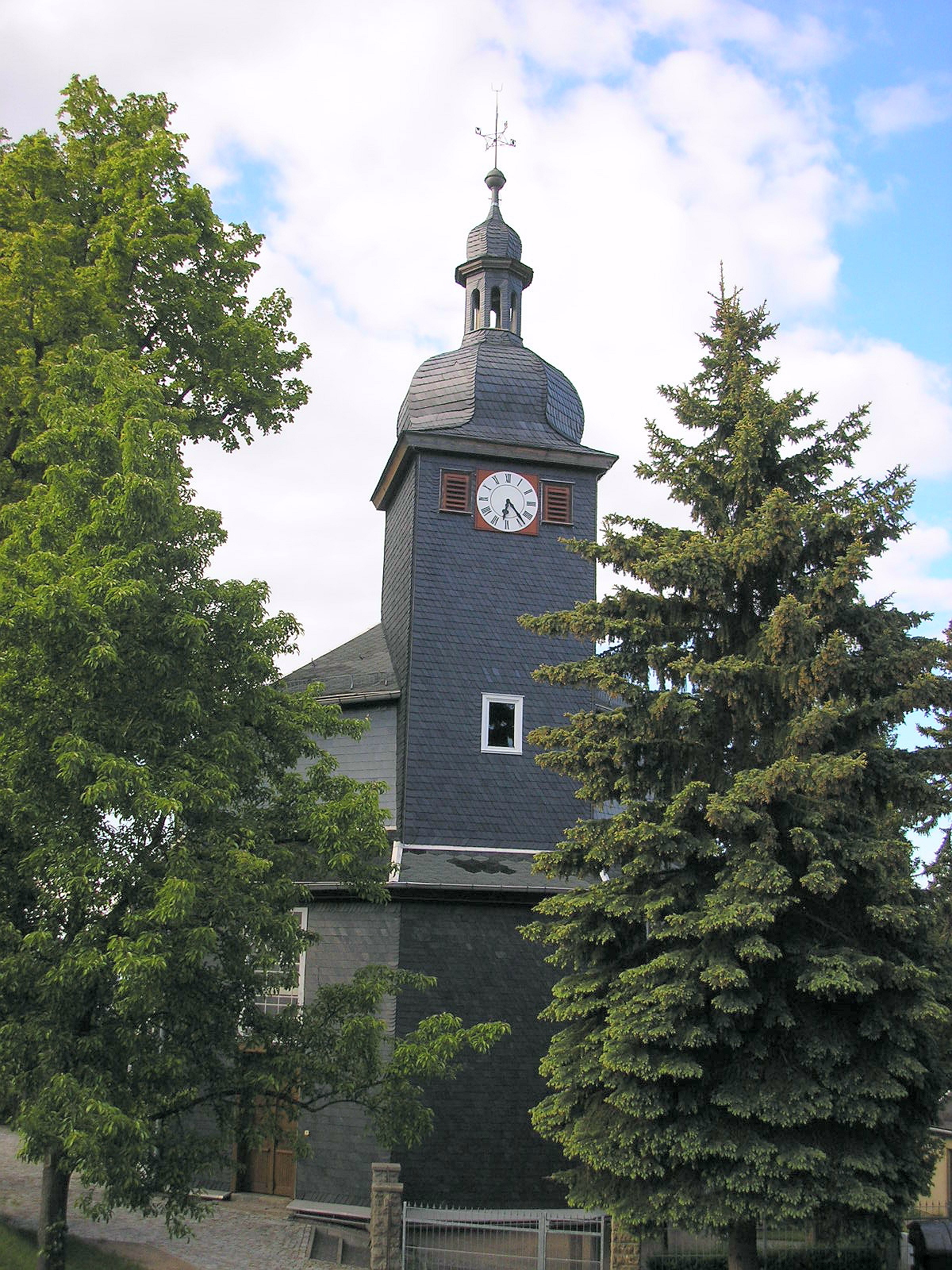 Kirche von Oehrenstock bei Ilmenau (Thüringen, Deutschland).